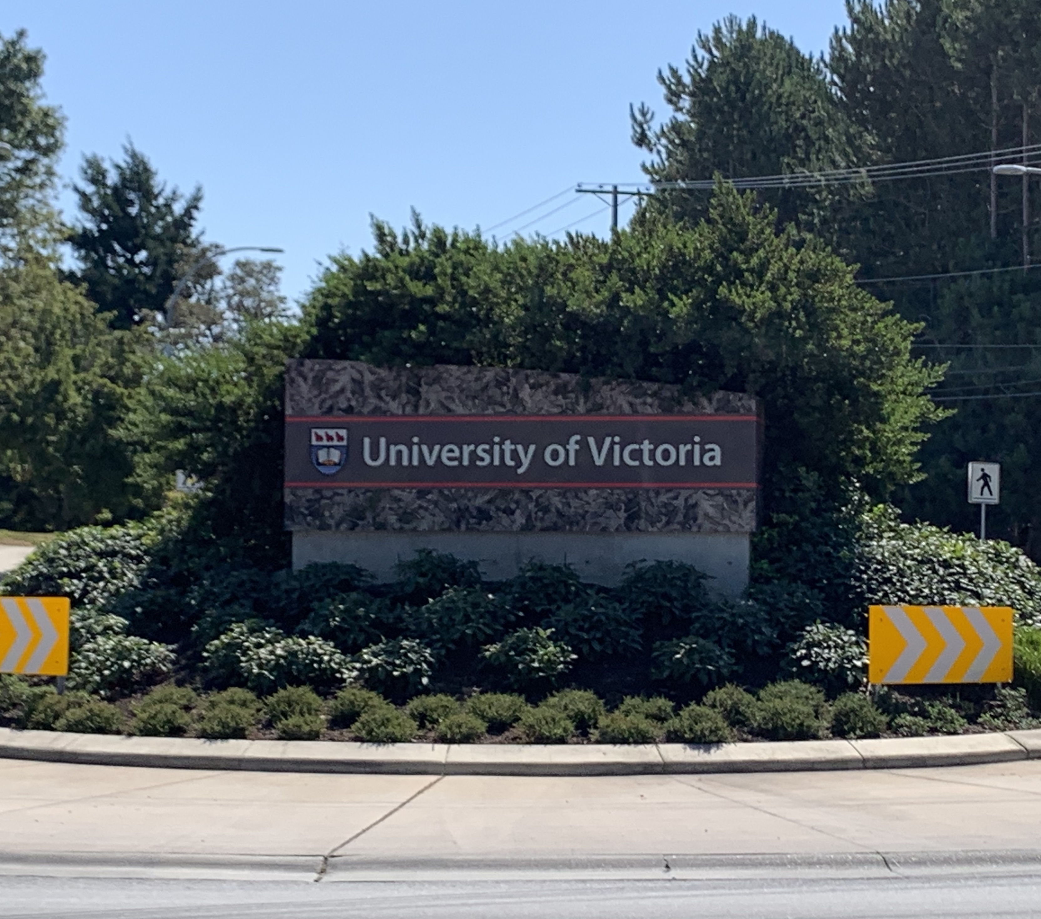 現地時間2019年8月8日午後12時51分